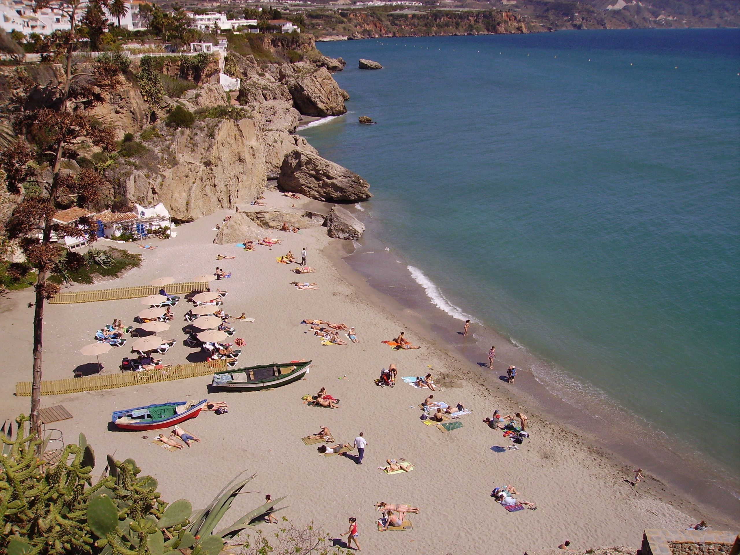 Playas de Nerja